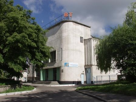 Наш телецентр з перспективою реконструкції